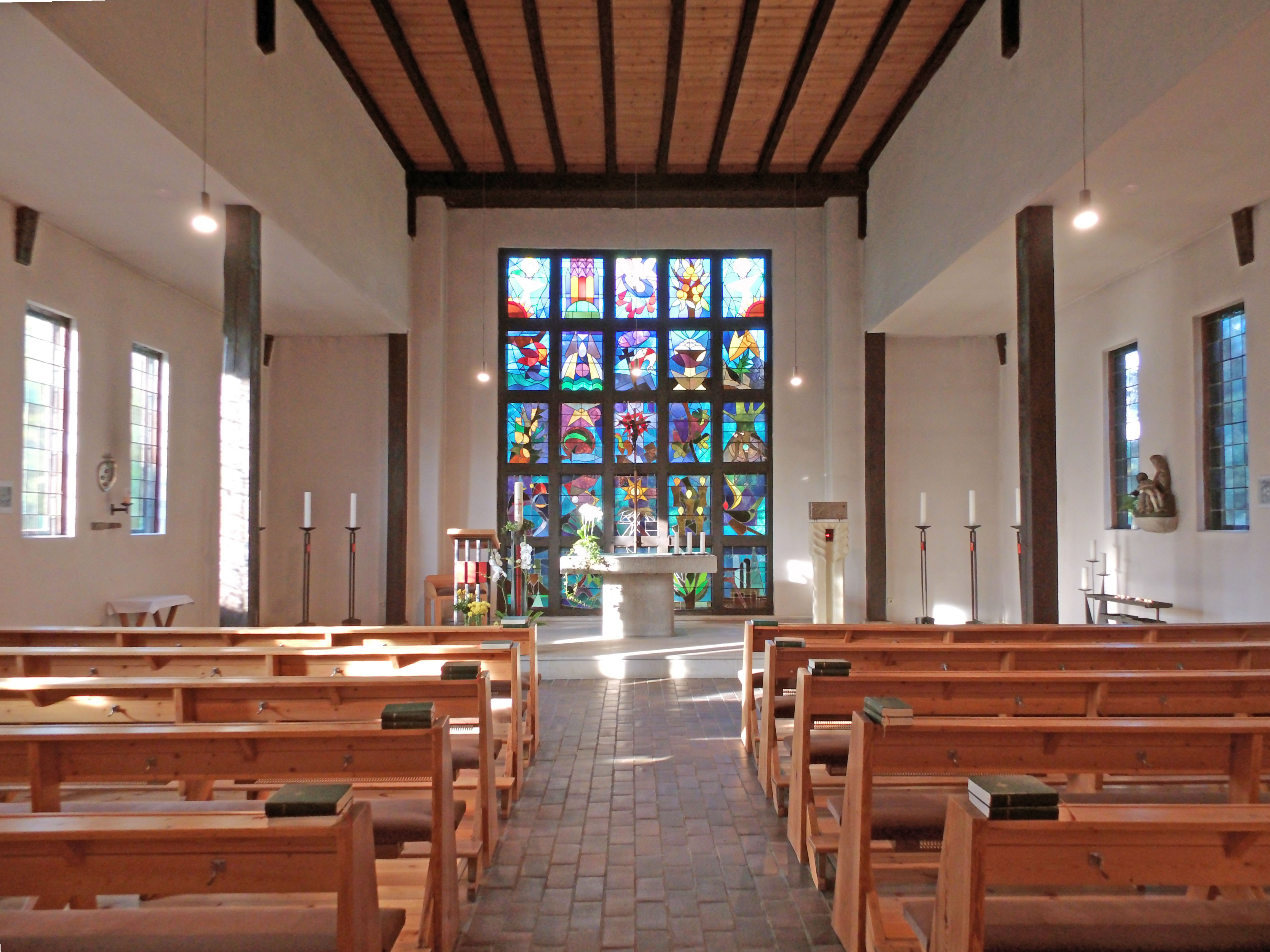 Katholische St.-Elisabeth-Kirche in Mieste bei Gardelegen.